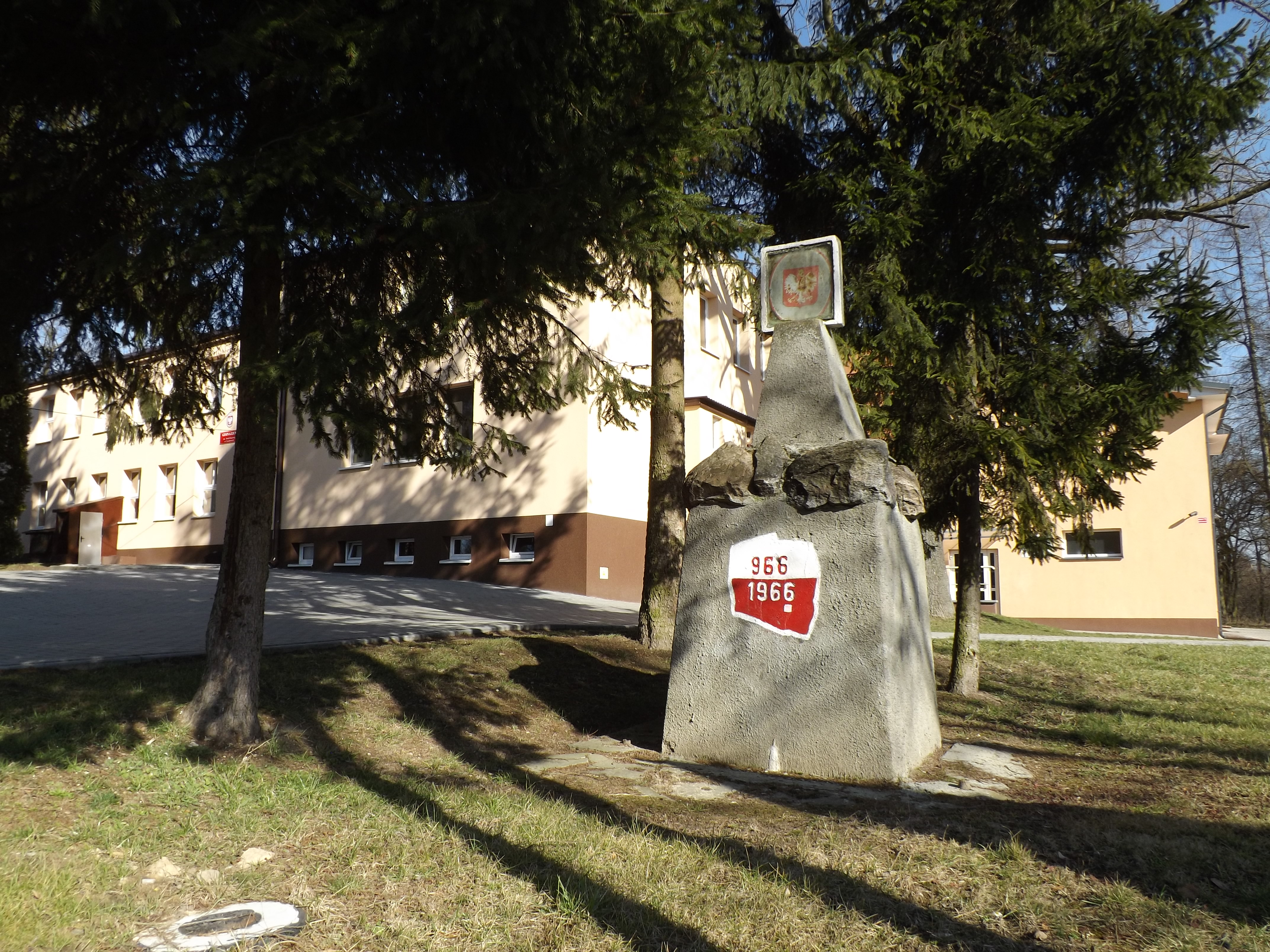 Pomnik Tysiąclecia Państwa Polskiego, Cieszkowy ze zniszczonym godłem państwowym w nieestetycznej ramce.